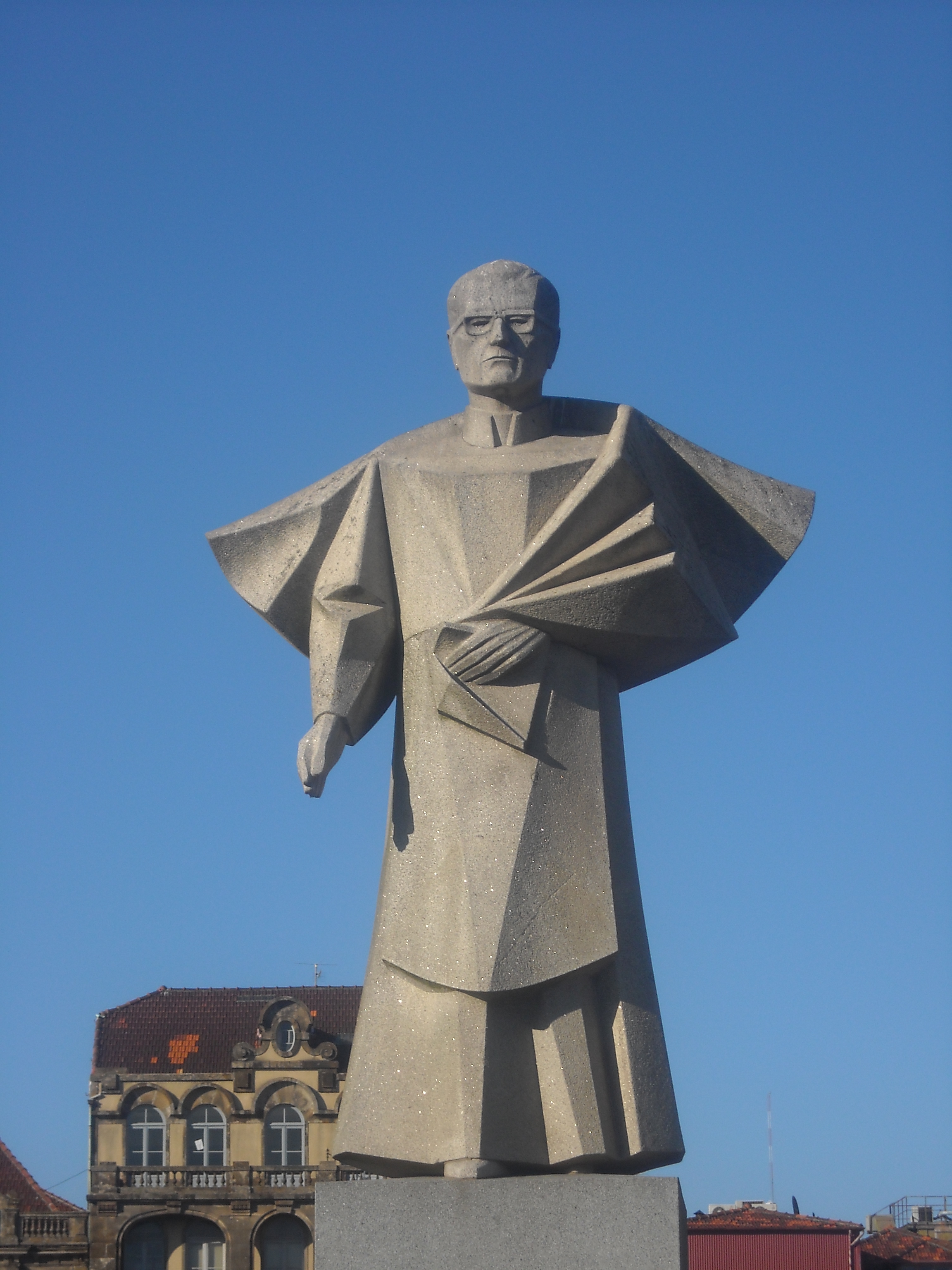 Estátua de António Ferreira Gomes, bispo da cidade do Porto de 1906 a 1989, localizada nos Clérigos, na cidade do Porto, em Portugal.